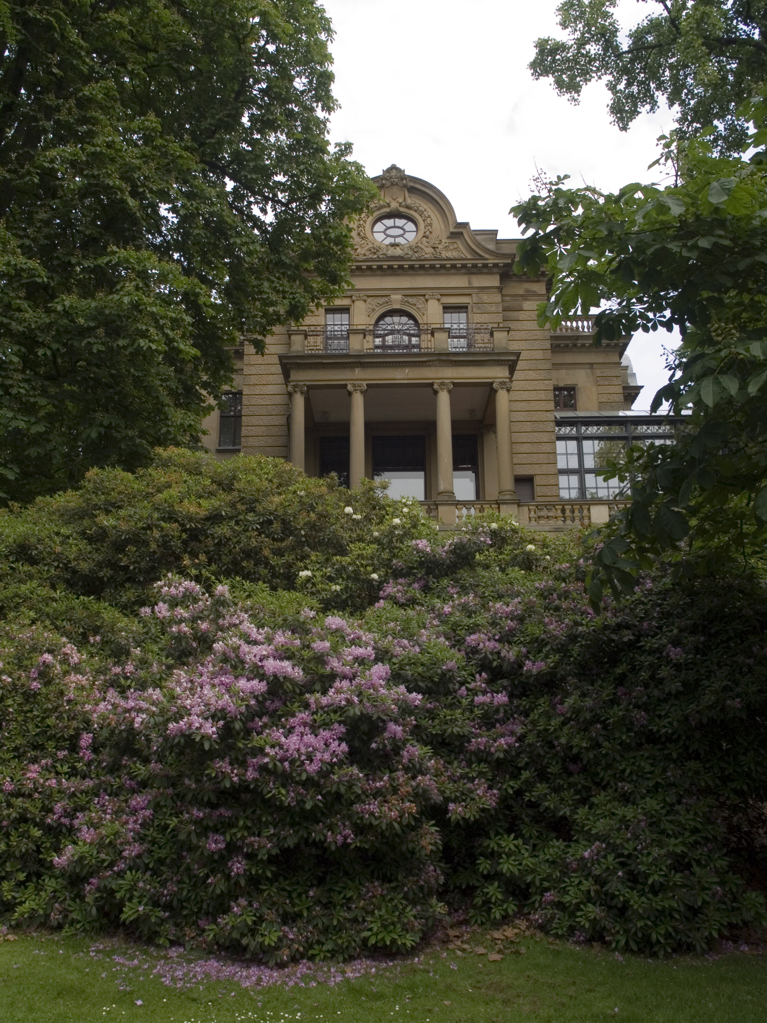 Северный Рейн-Вестфалия, Мюльхайм-на-Руре - вилла Йозефа Тиссена